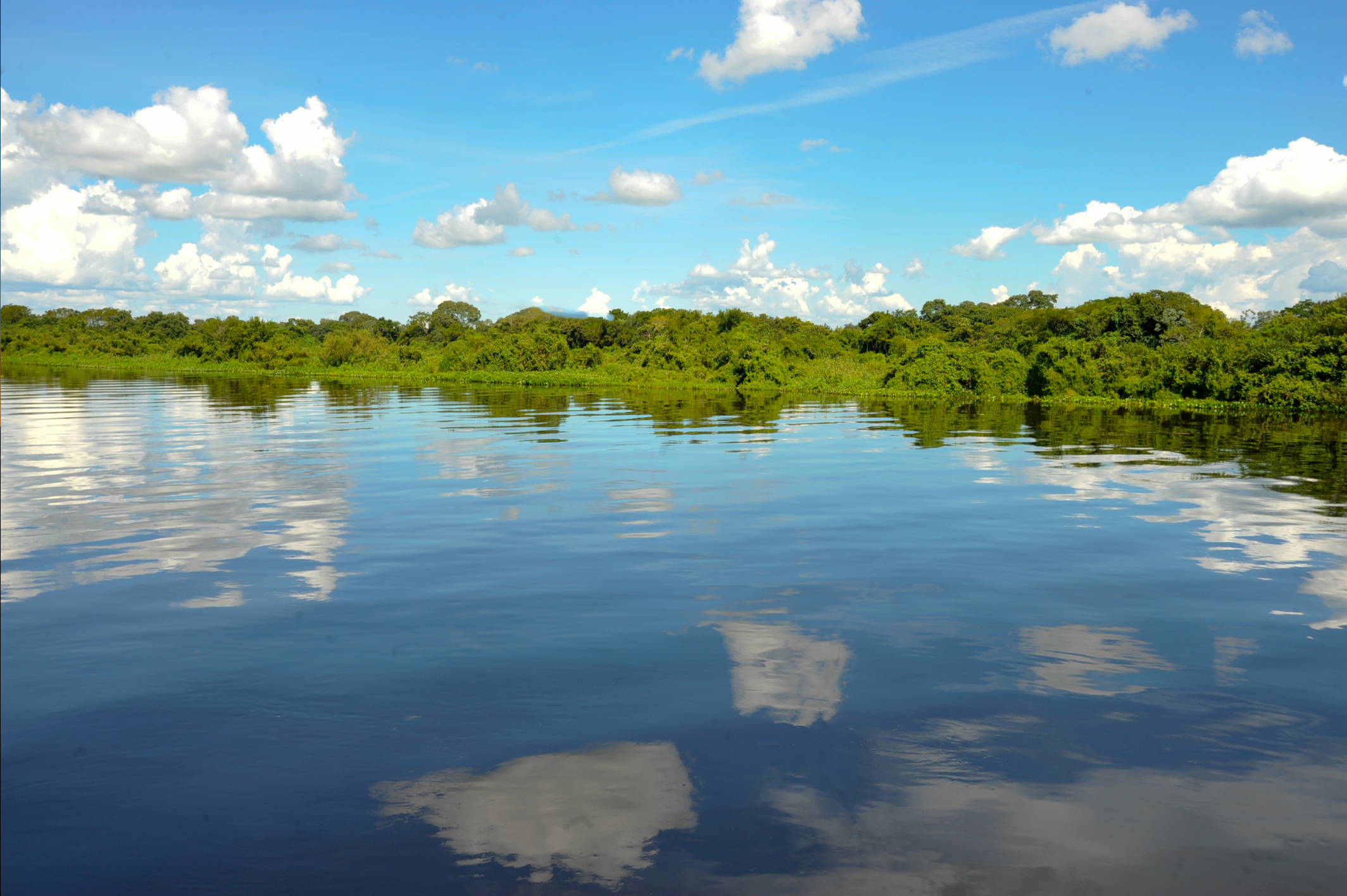 Pantanal maior planicie inundavel do mundo.Patrimonio natural da humanidade